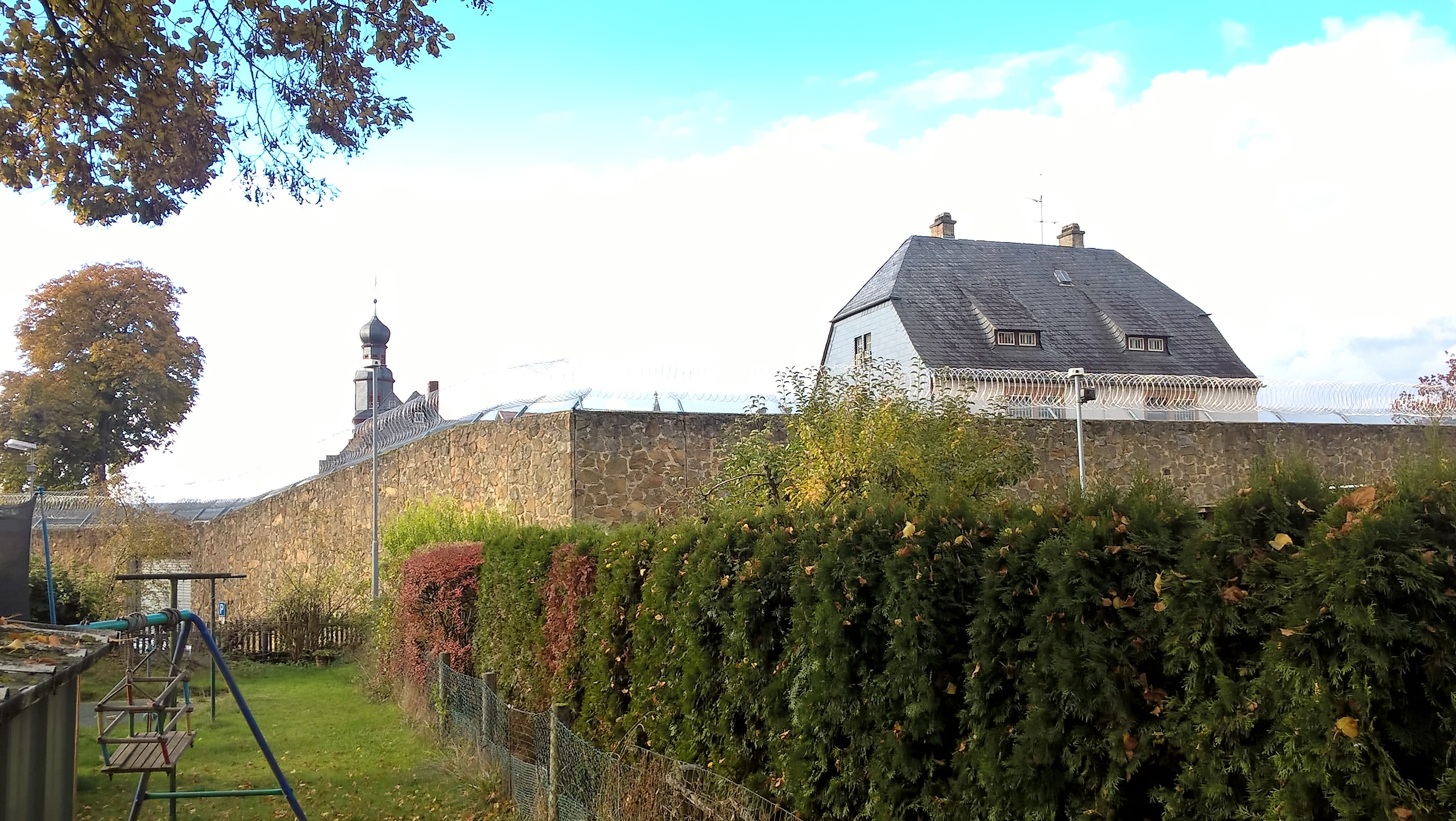 Südostecke JVA Rockenberg, Wetteraukreis, Hessen, Deutschland